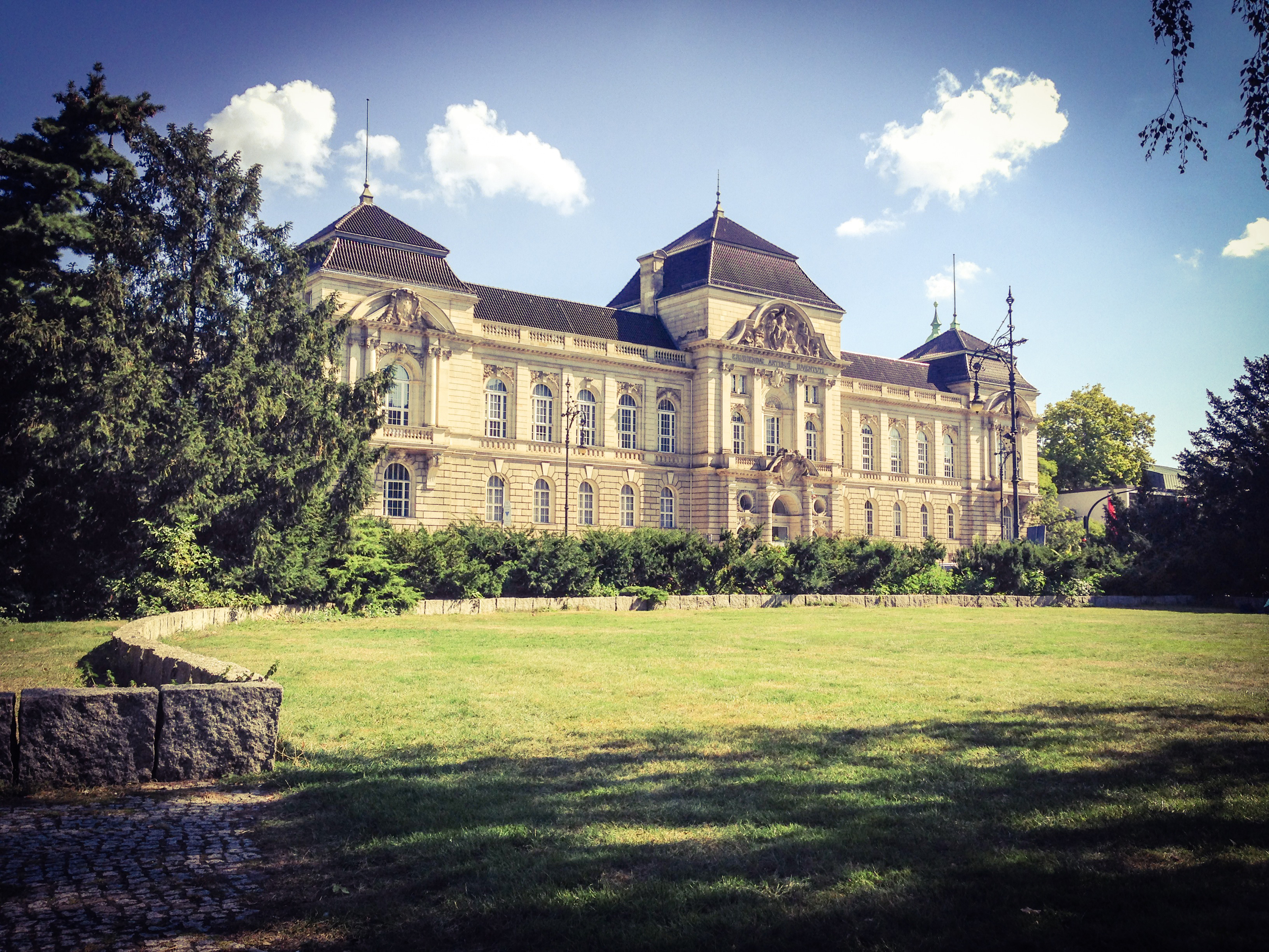 UdK Berlin, Standort Hardenbergstraße